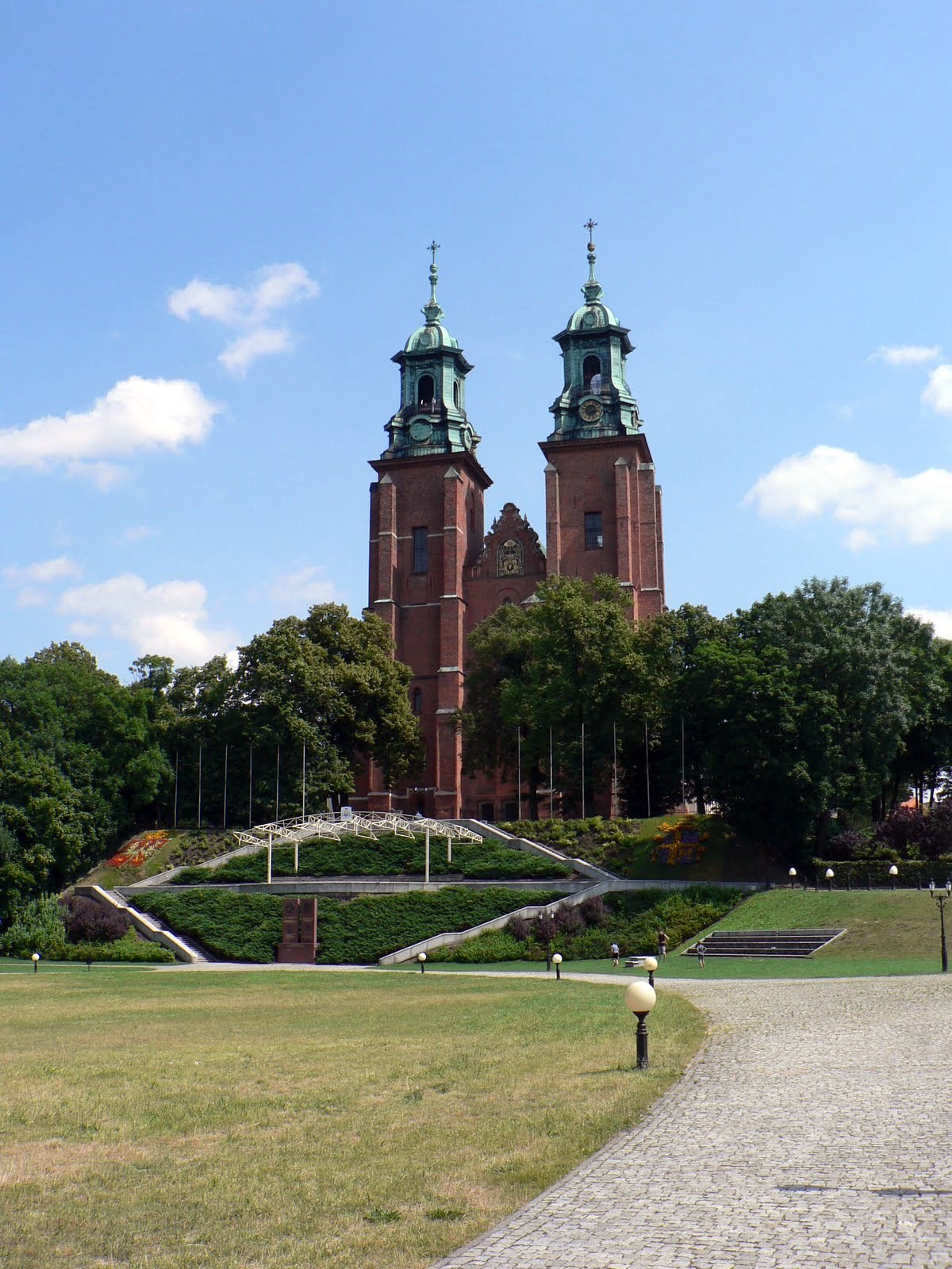 Katedra w Gnieźnie